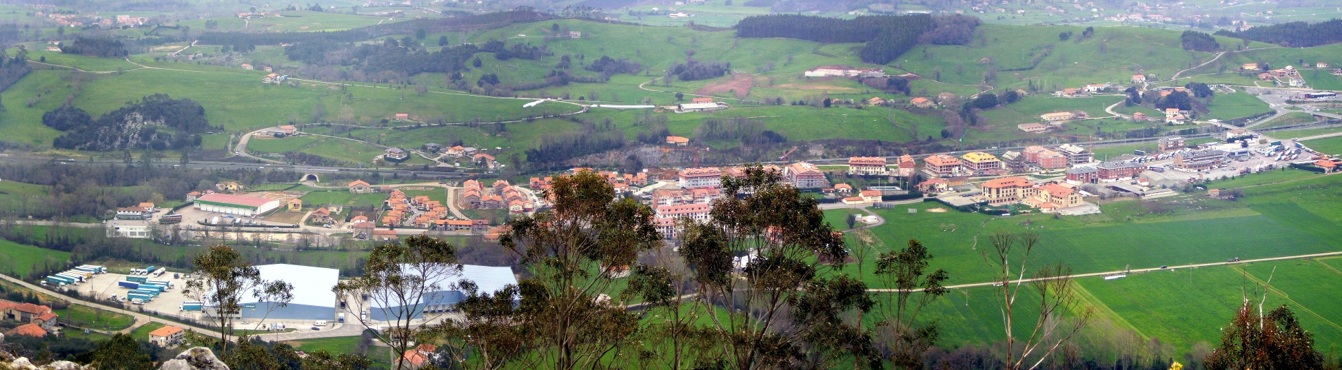 Panorámica de la localidad de Hoznayo, en Cantabria (España), vista desde el Pico Vizmaya